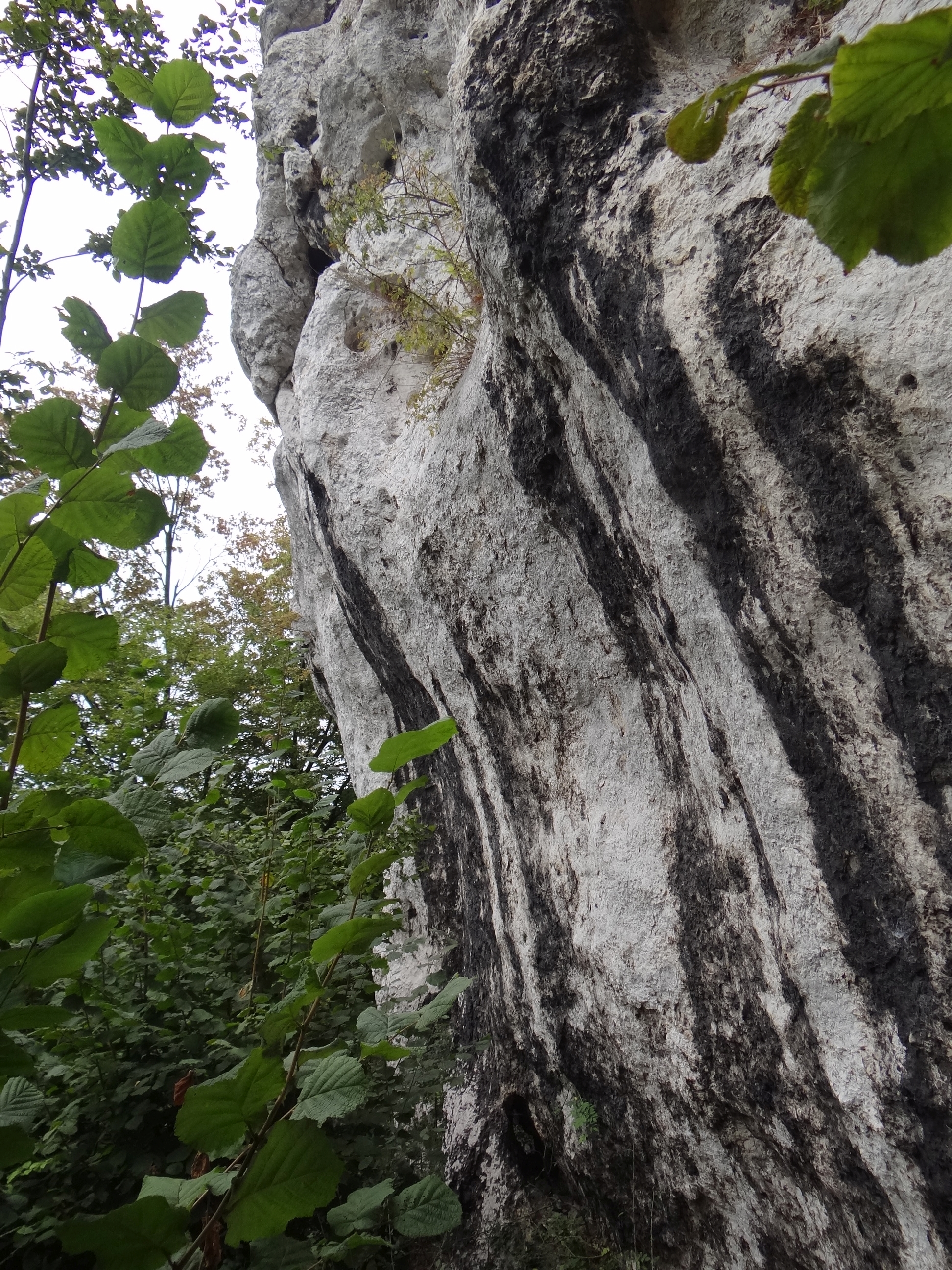 Skała Hyla w Morsku